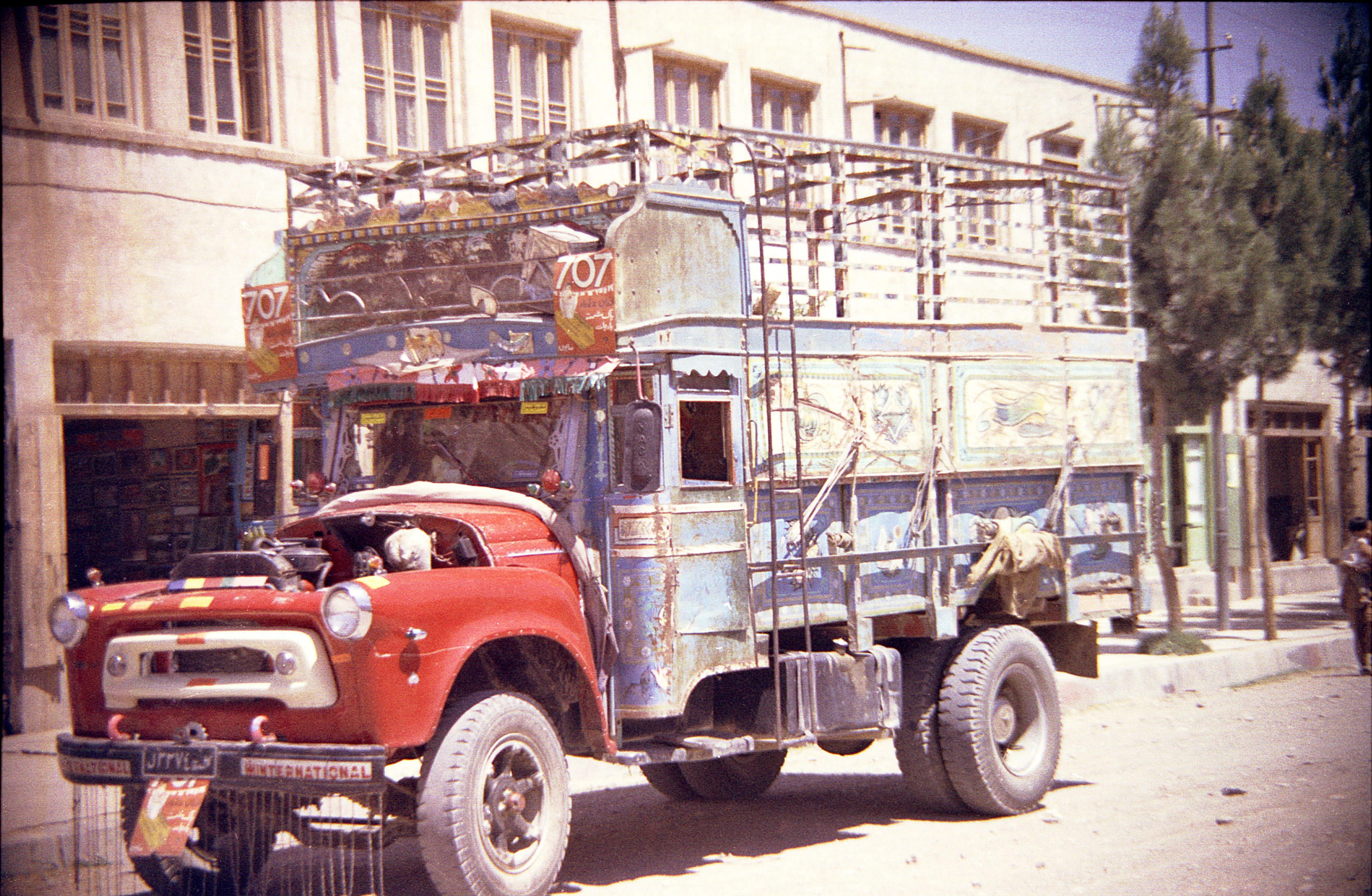 camion dans les rues d'Herat en Afghanistan en 1969